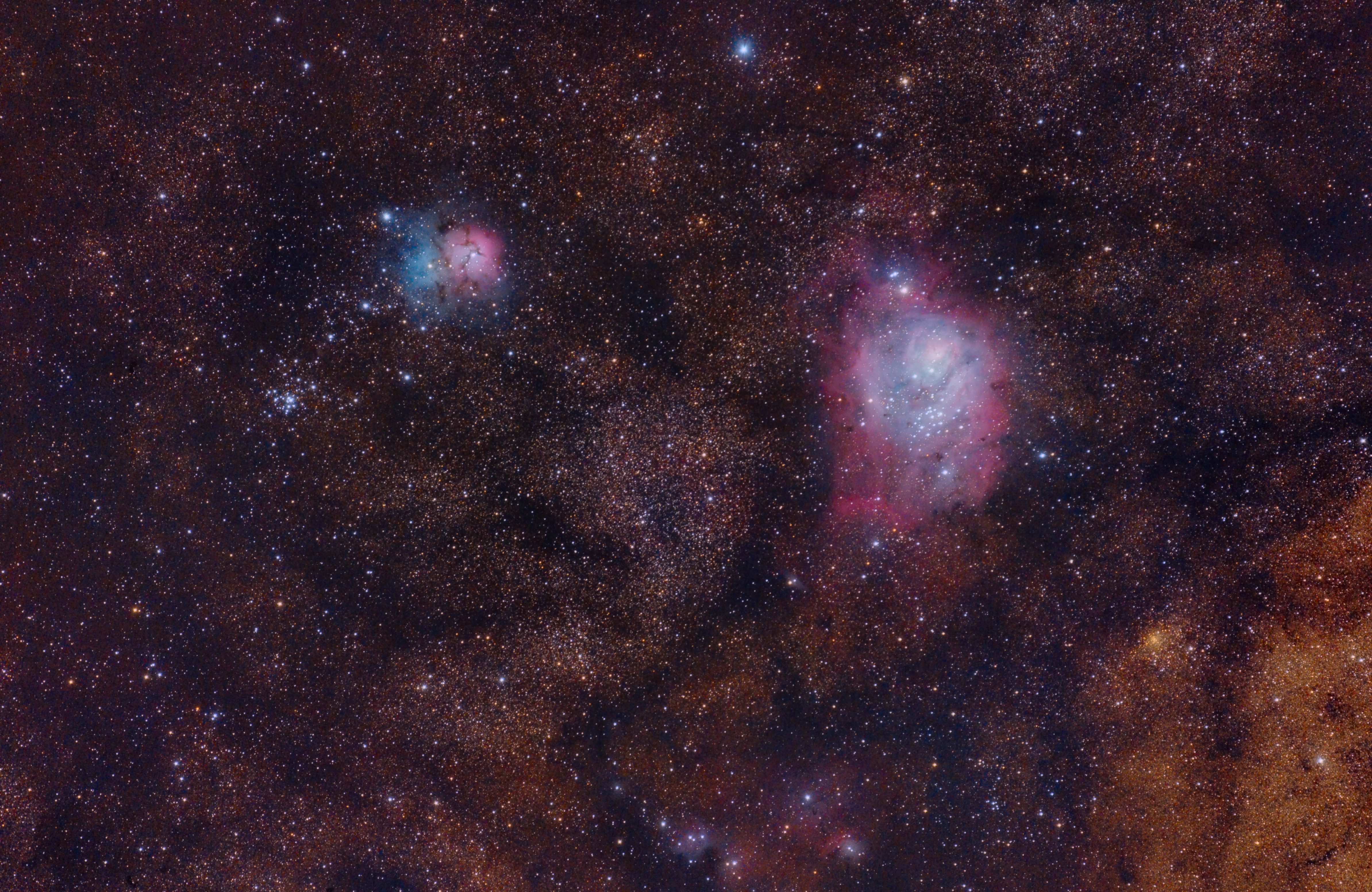 Nebulosa de Trífida o M20 y Nebulosa de la Laguna o M8 tomadas desde el Observatorio Astronómico Los Molinos, Montevideo, Uruguay.